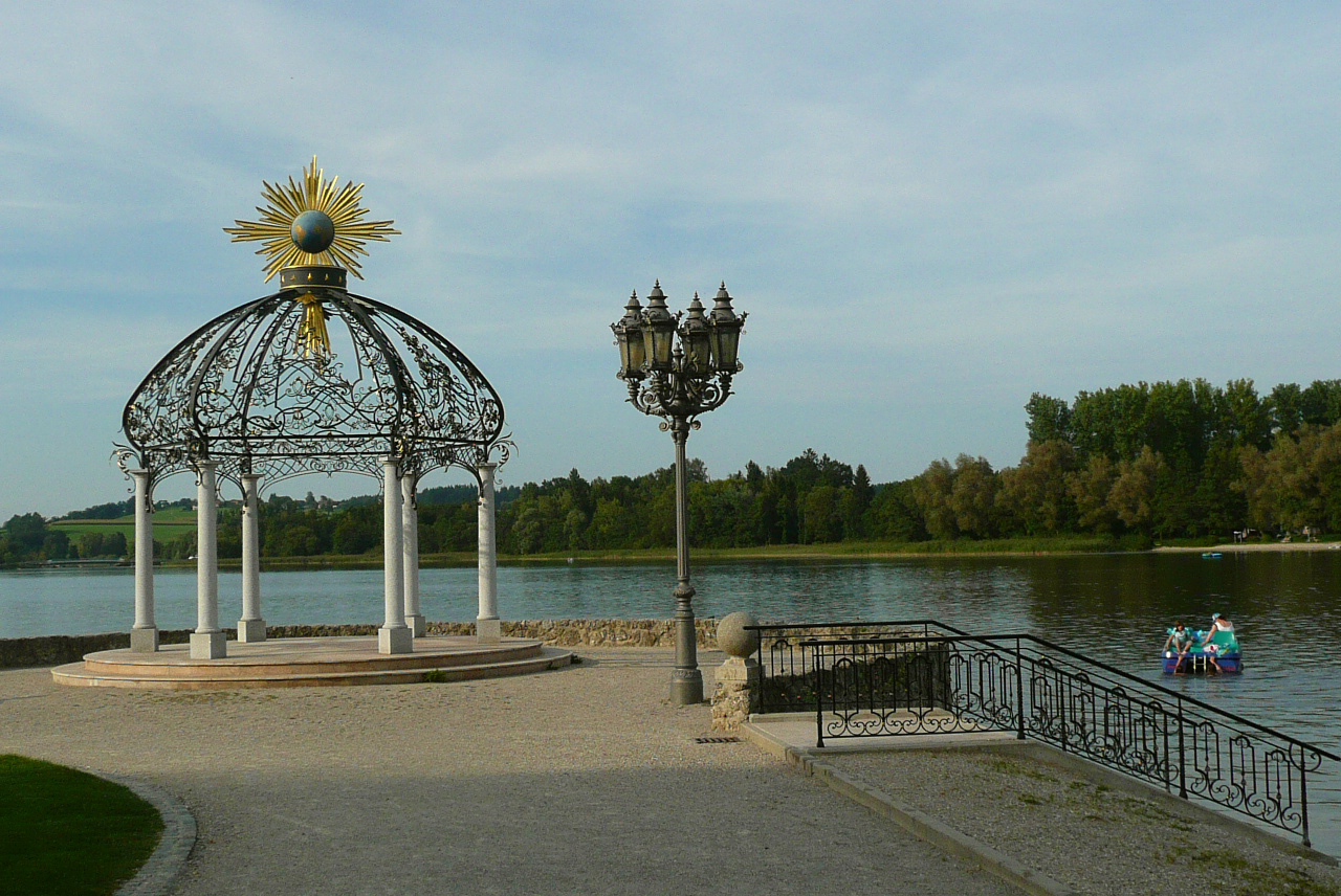 La rotonde à la promenade autour du lac Waginger See